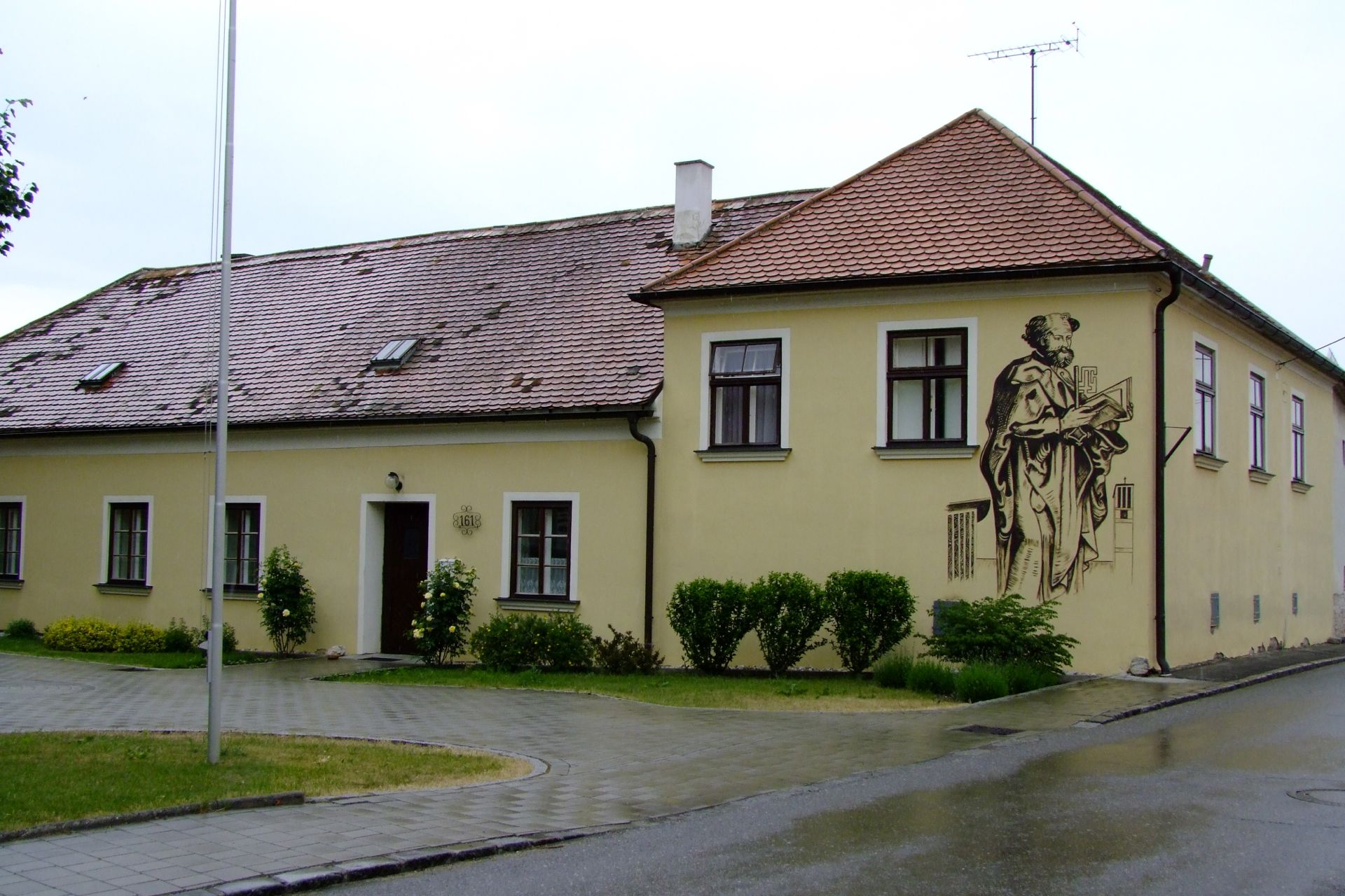 Pfarrhof